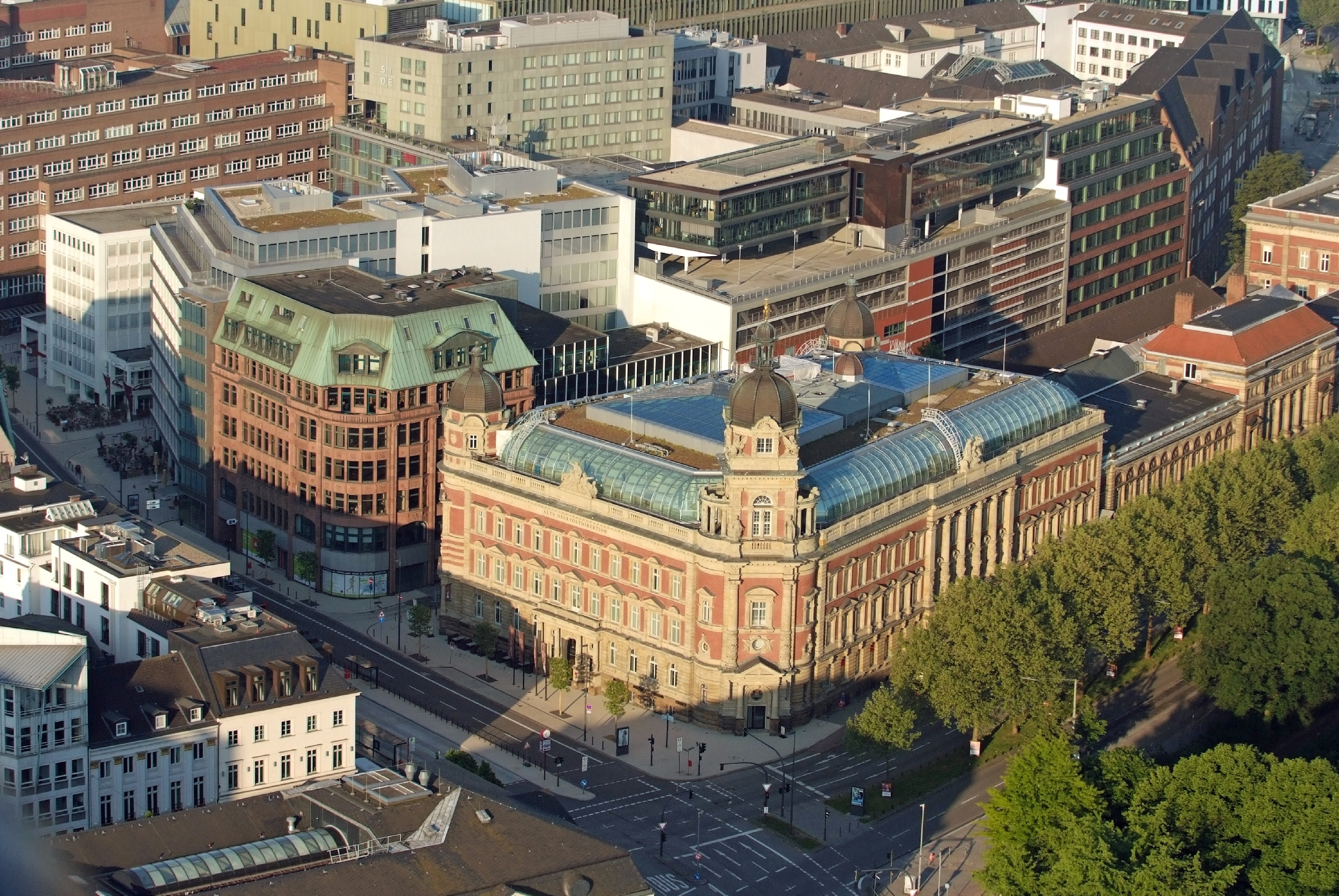 Projekt HeißluftballonThis is a photograph of an architectural monument. aF/11931, 11932, 11985; 12581 - 12583 nF Alte Oberpostdirektion, Stephansplatz. Dammtorstraße - Gorch-Fock-Wall